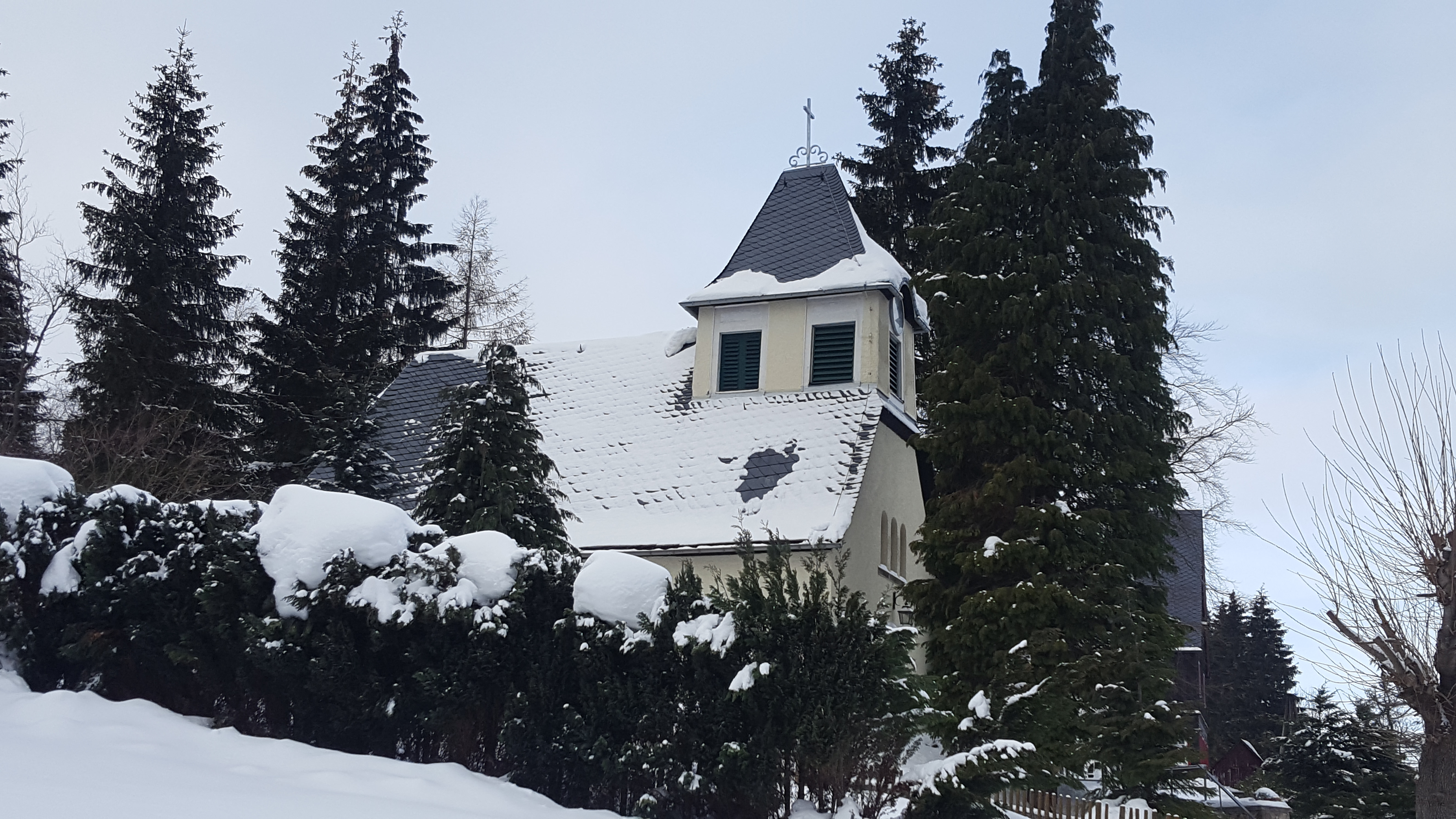 Oberbärenburg; evangelische Waldkapelle im Winter